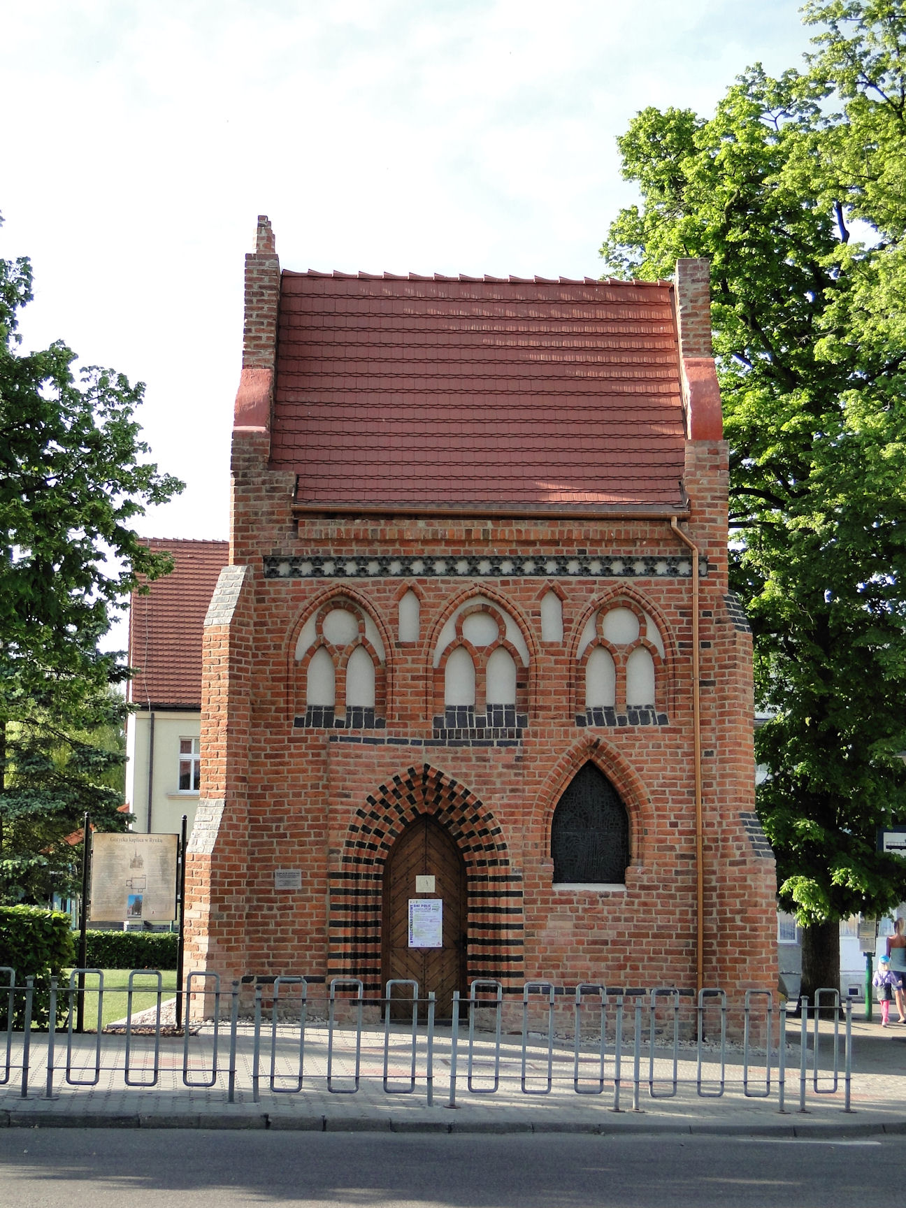 Kaplica gotycka w Policach - elewacja południowa